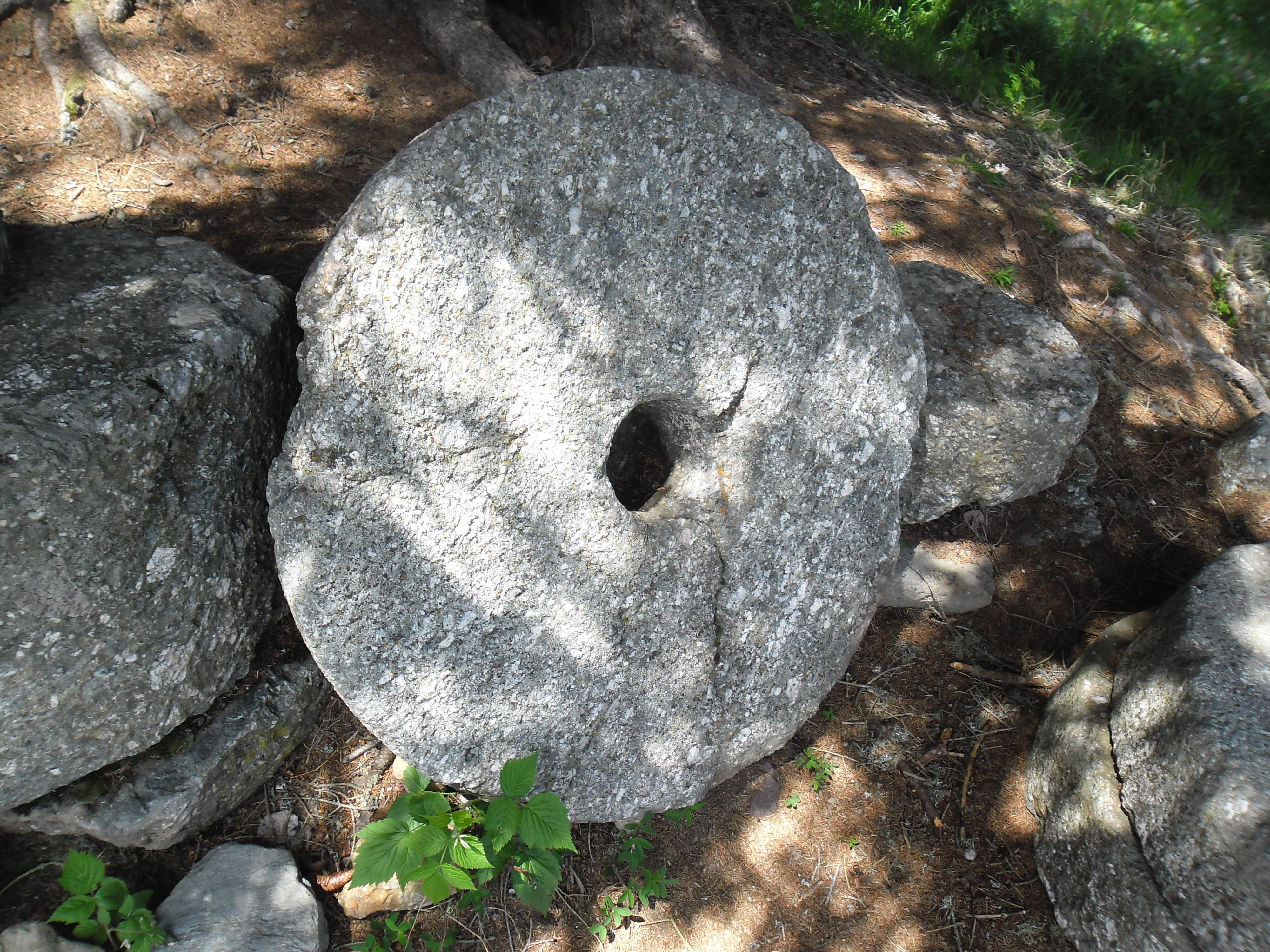 Mühlenstein aus Sexten in Südtirol.